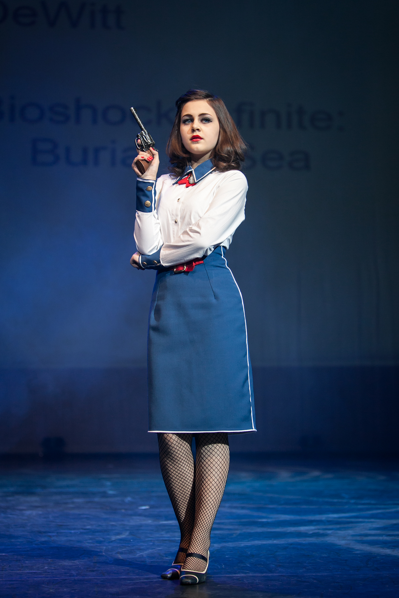 20140118170836IMG_5273